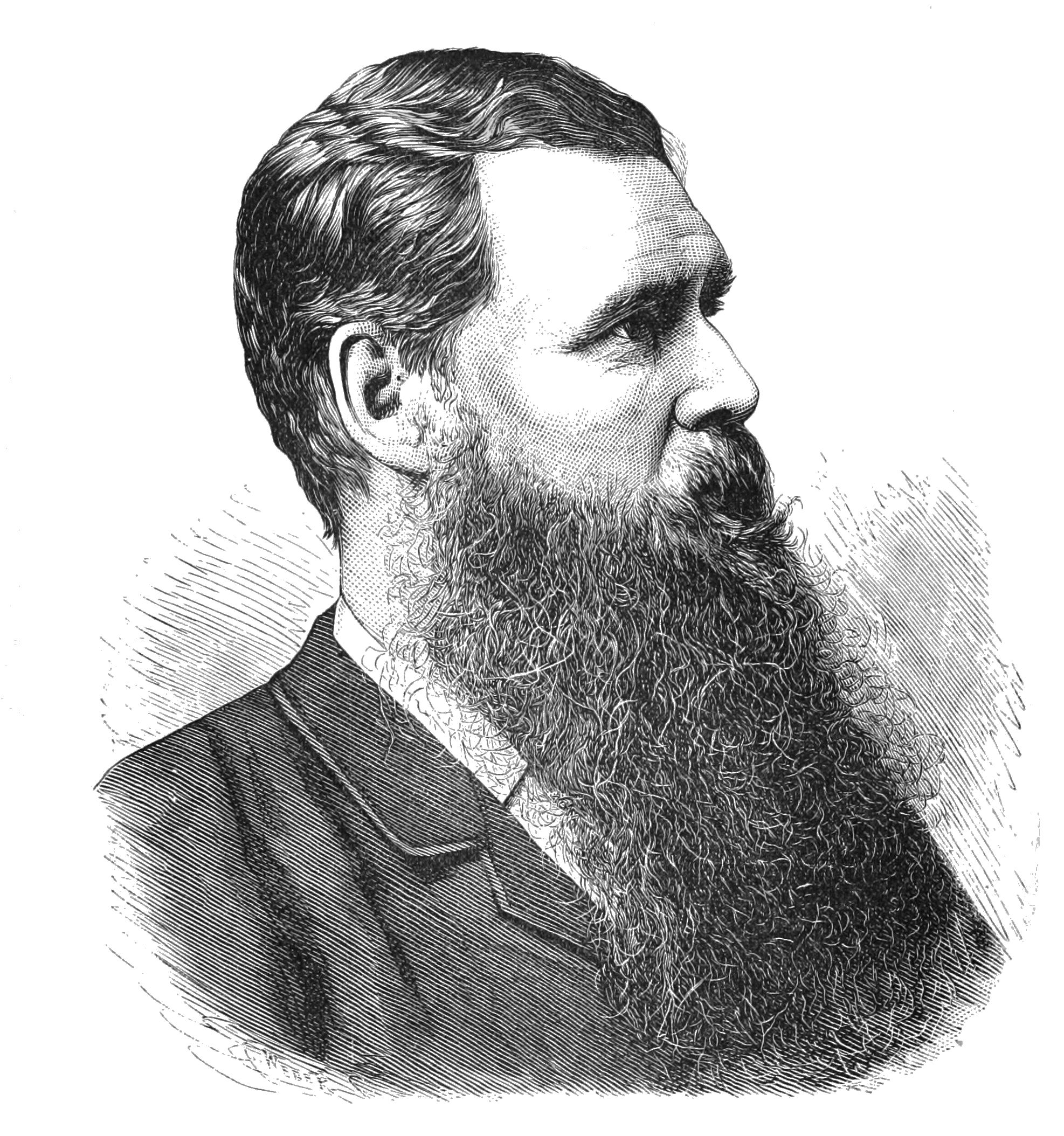 Edward Burnett Tylor